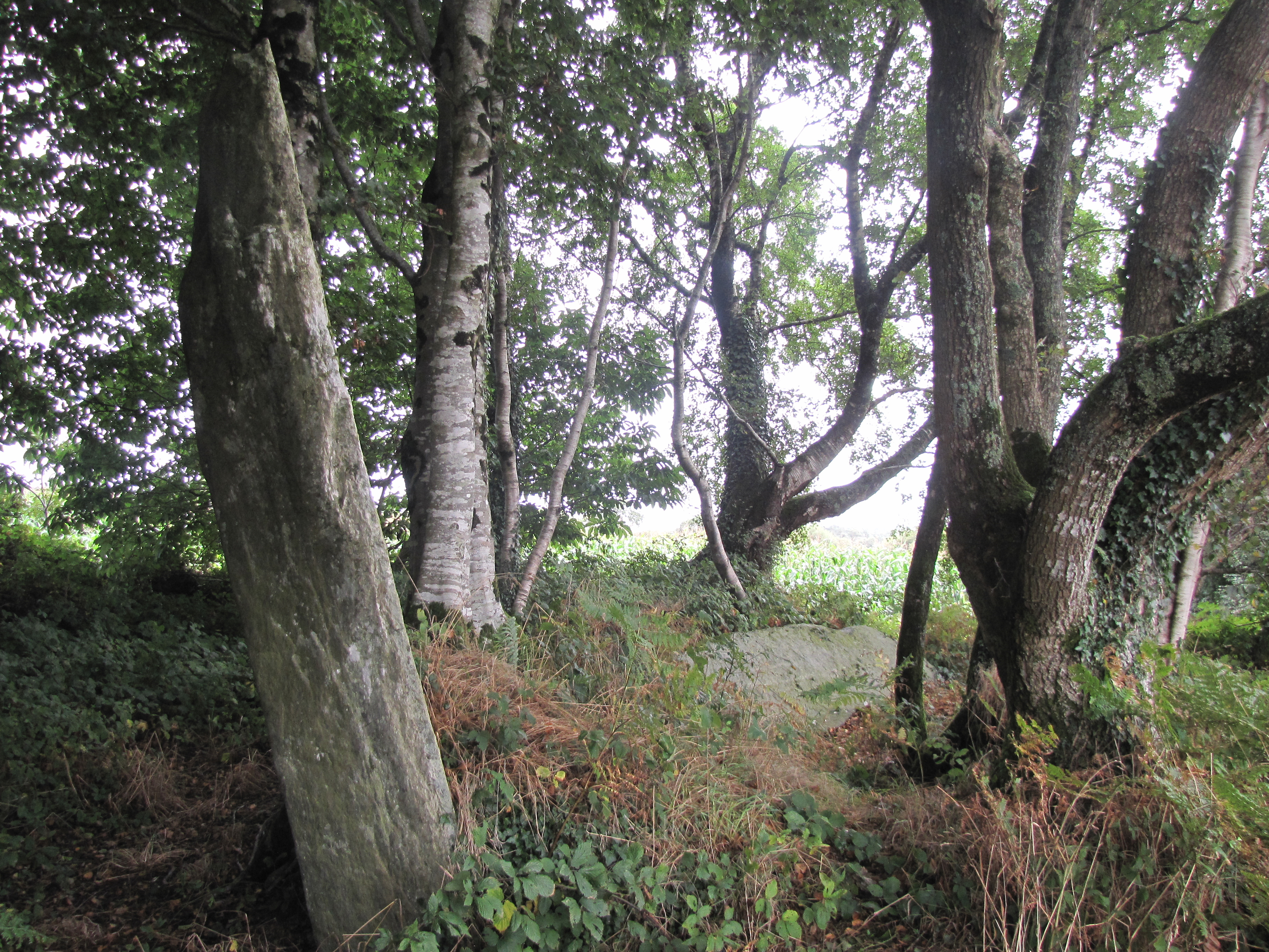 Ce menhir fait à l'origine partie d'un alignement de 3 rochers détruit en 1967. Aujourd'hui 2 rochers sont au sol, dont un avec des inscriptions. .